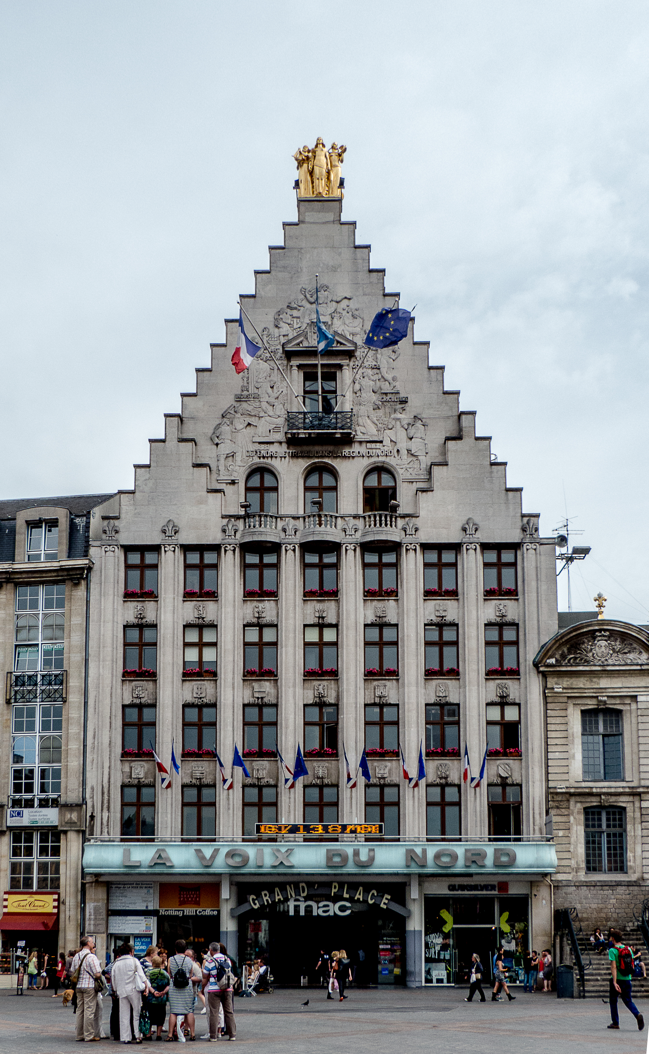 Lille - Grand'place : La Voix du Nord. Architecte : Ernest Willoqueaux (1936-1938)